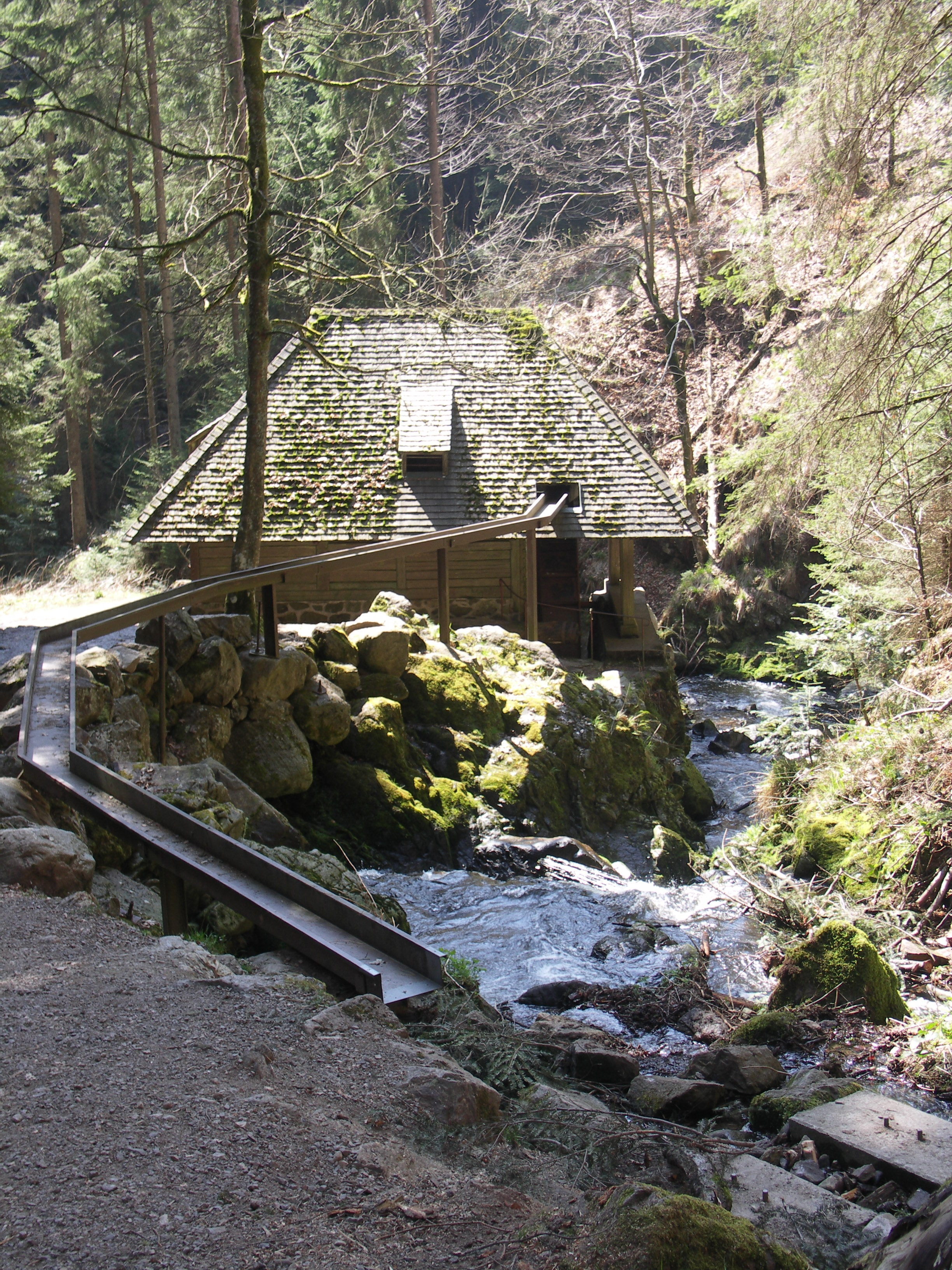 Großjockenmühle am oberen Ende der Ravennaschlucht, Schwarzwald